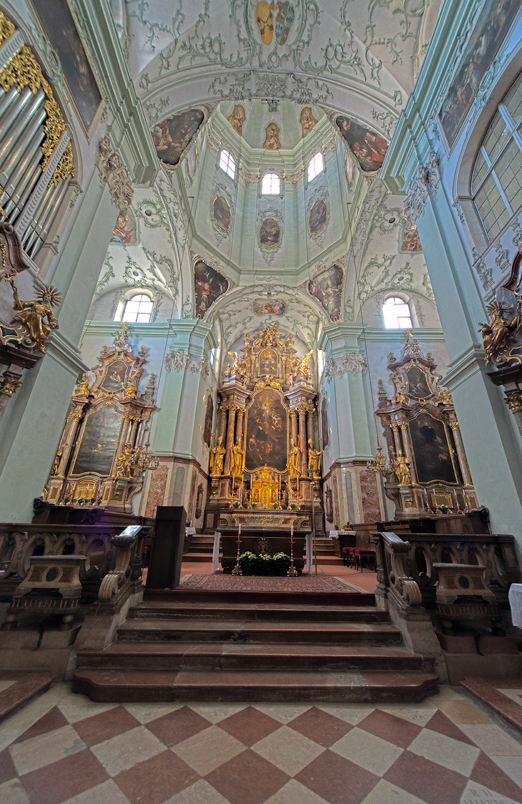 St Peter's Church (HDR)